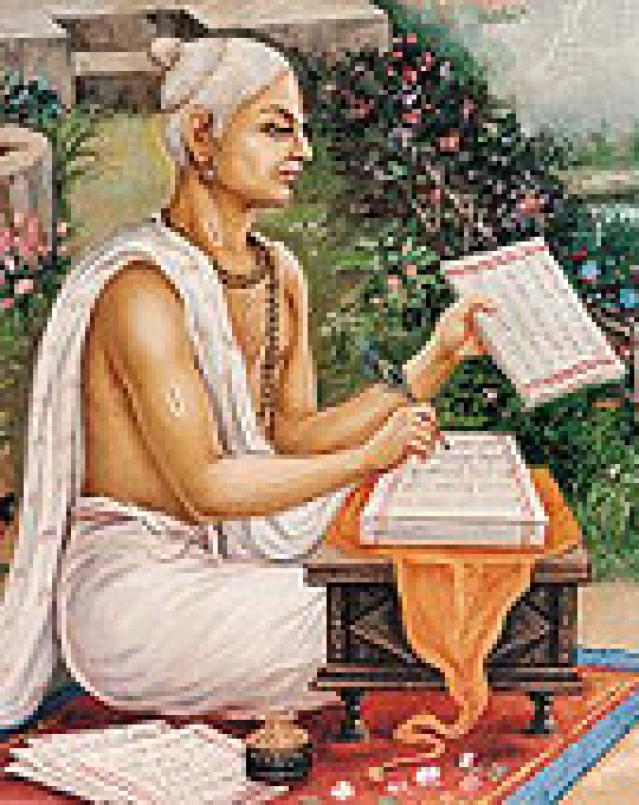 नेपाल भाषा: Jyotish Gunakar Joshi